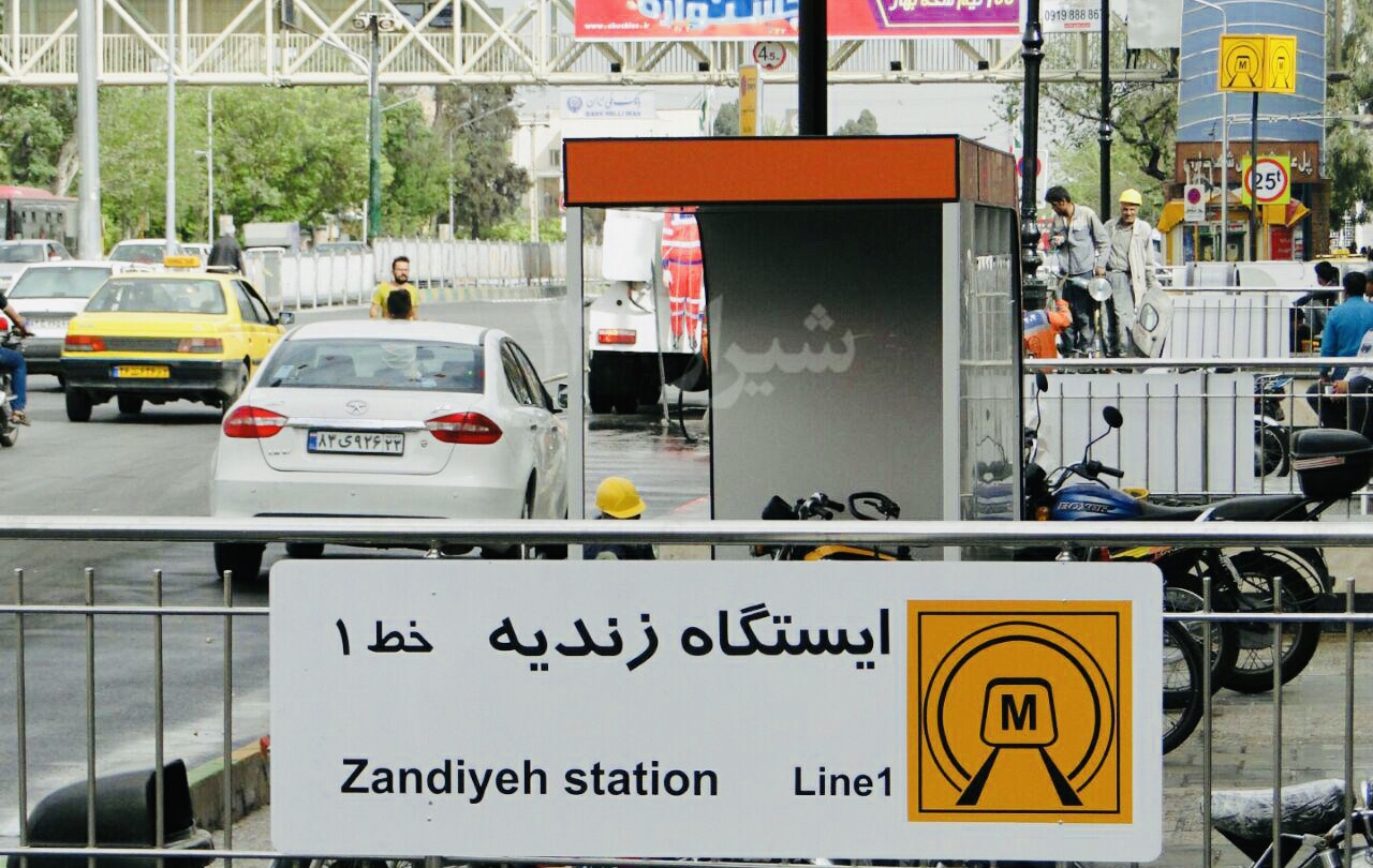 ایستگاه متروی زندیه،درب ورودی